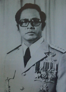 Foto Jenderal TNI Surono Reksodimejo